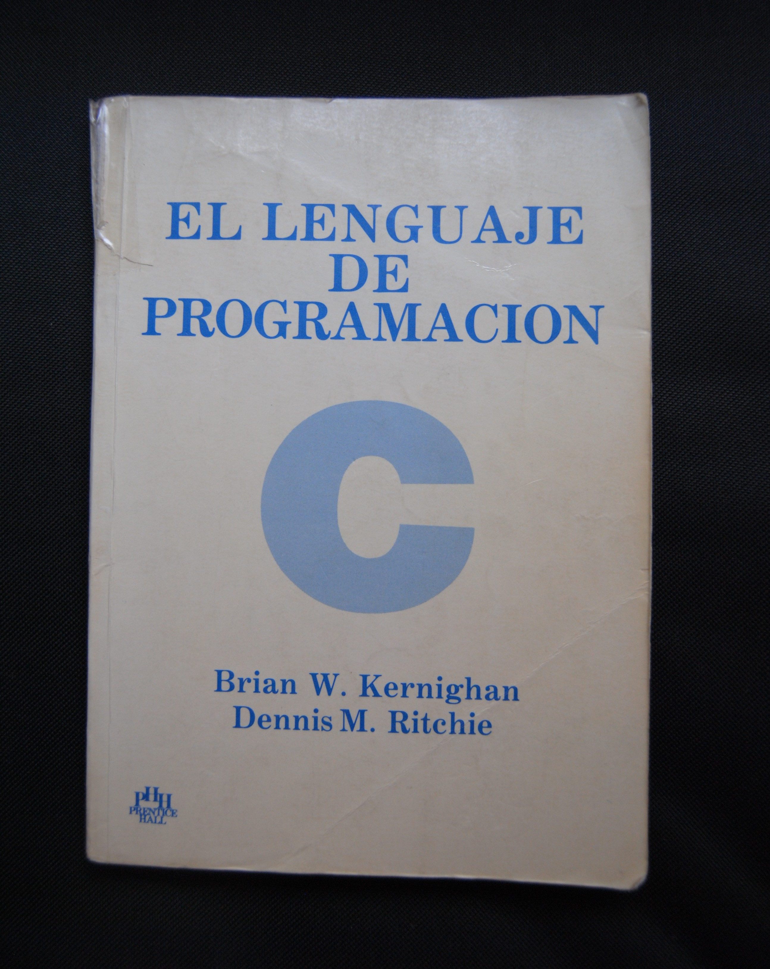 El lenguaje de programación C (primera edición)